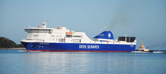 Regina Seaways